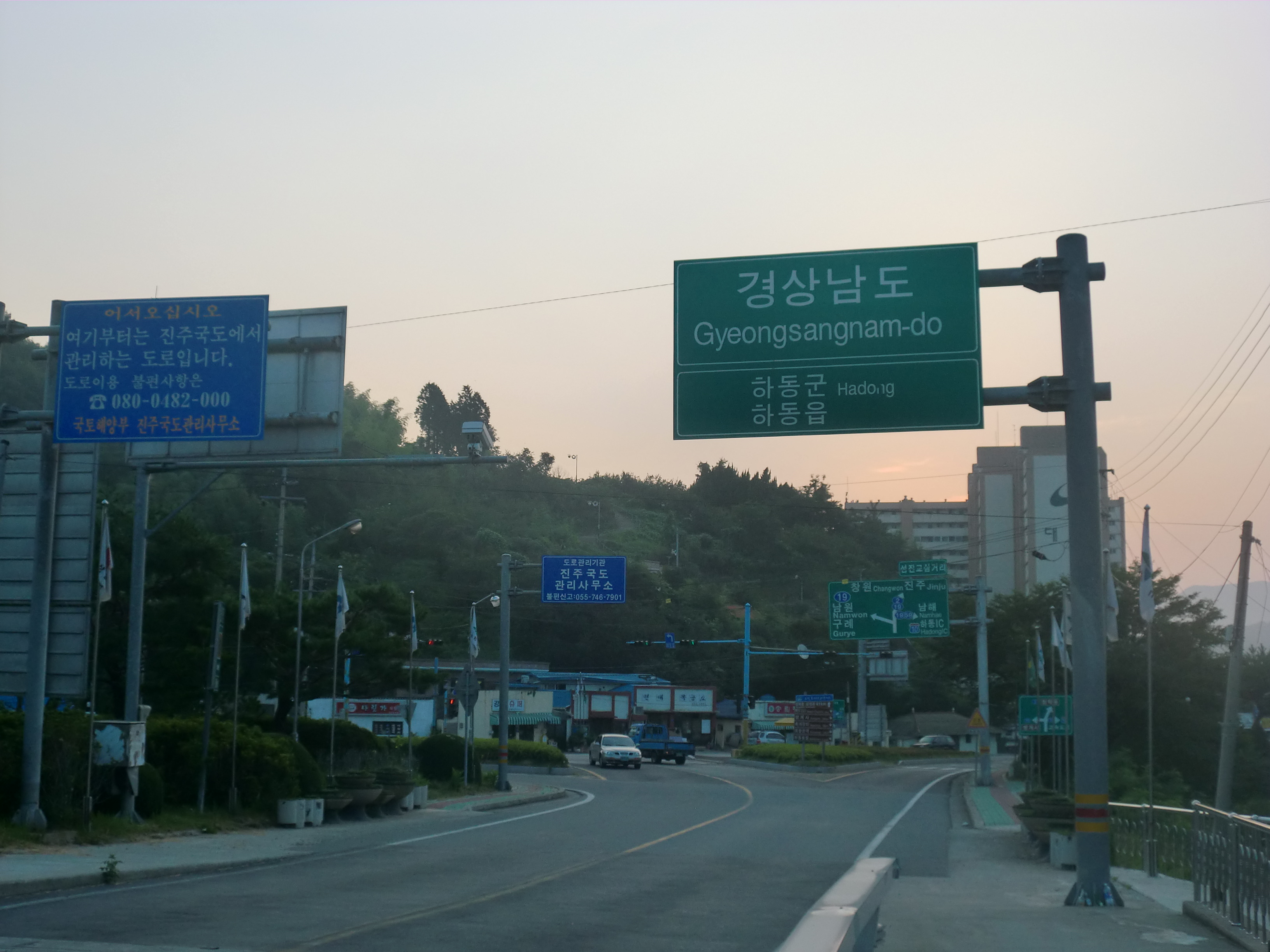 국도2호선에 있는 전라남도 광양시와 경상남도 하동군의 경계